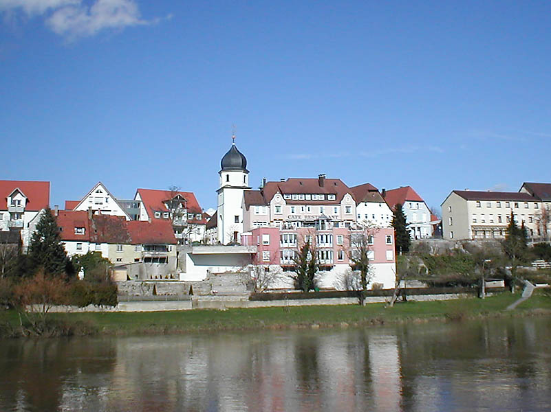 Blick über den Neckar auf Bad Fredrichshall-Jagstfeld